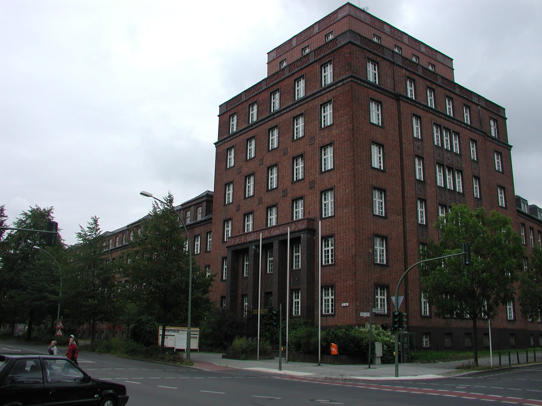 Straße im Ortsteil Berlin-Weißensee: Liebermannstr. Ecke Berliner Allee